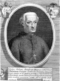 Fabrizio Sceberras Testaferrata (1757-1843) Kardinal aus Malta, Apostolischer Nuntius in der Schweiz